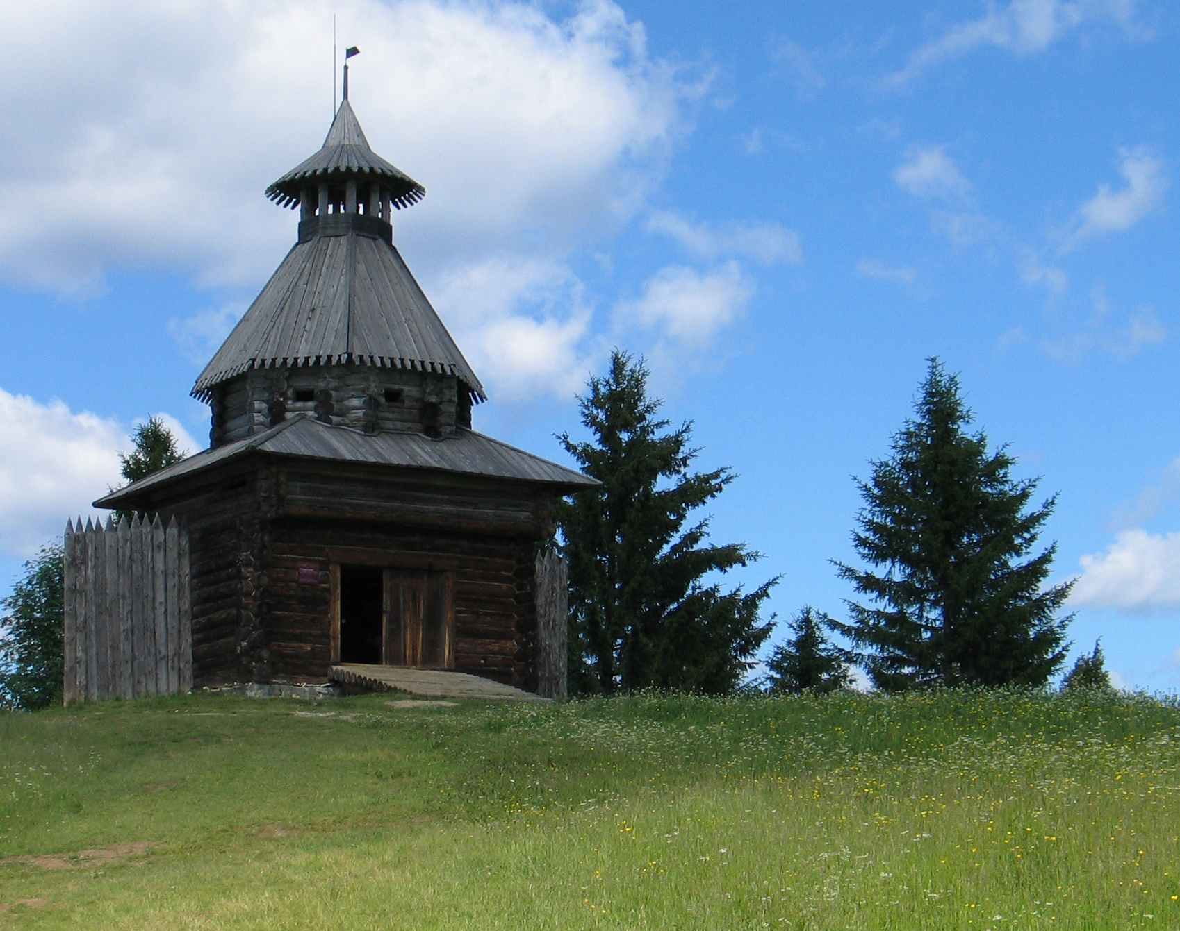 Башня сторожевая из села Торговище Суксунского района: Хохловка, Пермский район, Пермский край